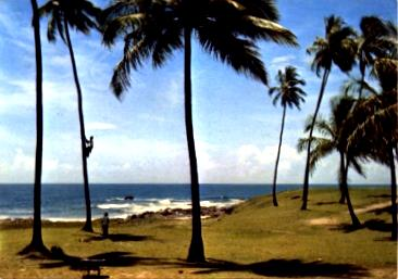 praia Jardim de Alah, Salvador, Bahia, Brasil